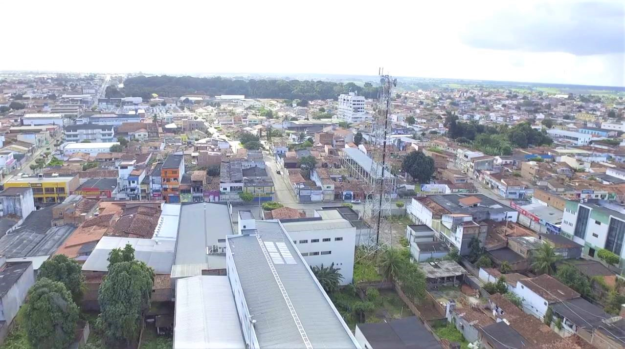 Centro comercial de Cruz das Almas - Bahia.